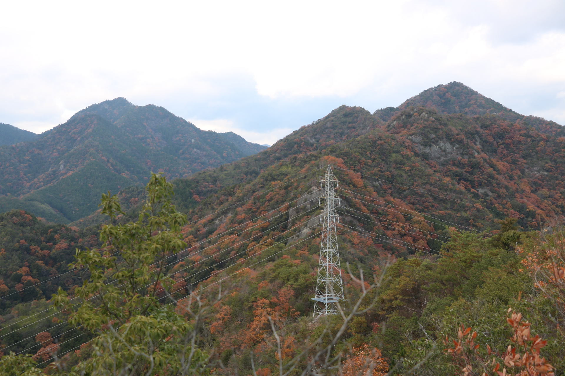 七種槍南側の353mピーク付近から見た七種槍(右)と七種山(左)